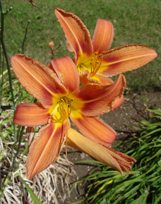 Hemerocallis fulva , Jardin des Plantes de Paris